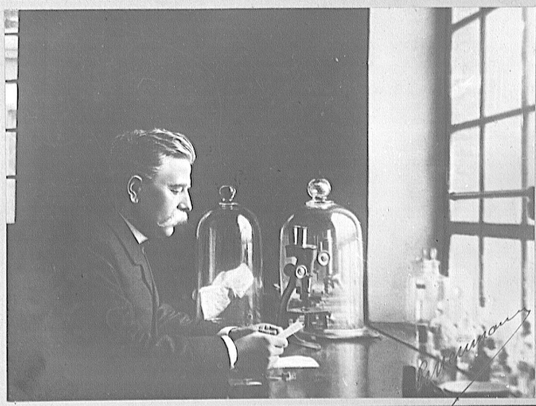 Louis Georges Neumann (1846 - 1930), professeur de parasitologie à l'École nationale vétérinaire de Toulouse